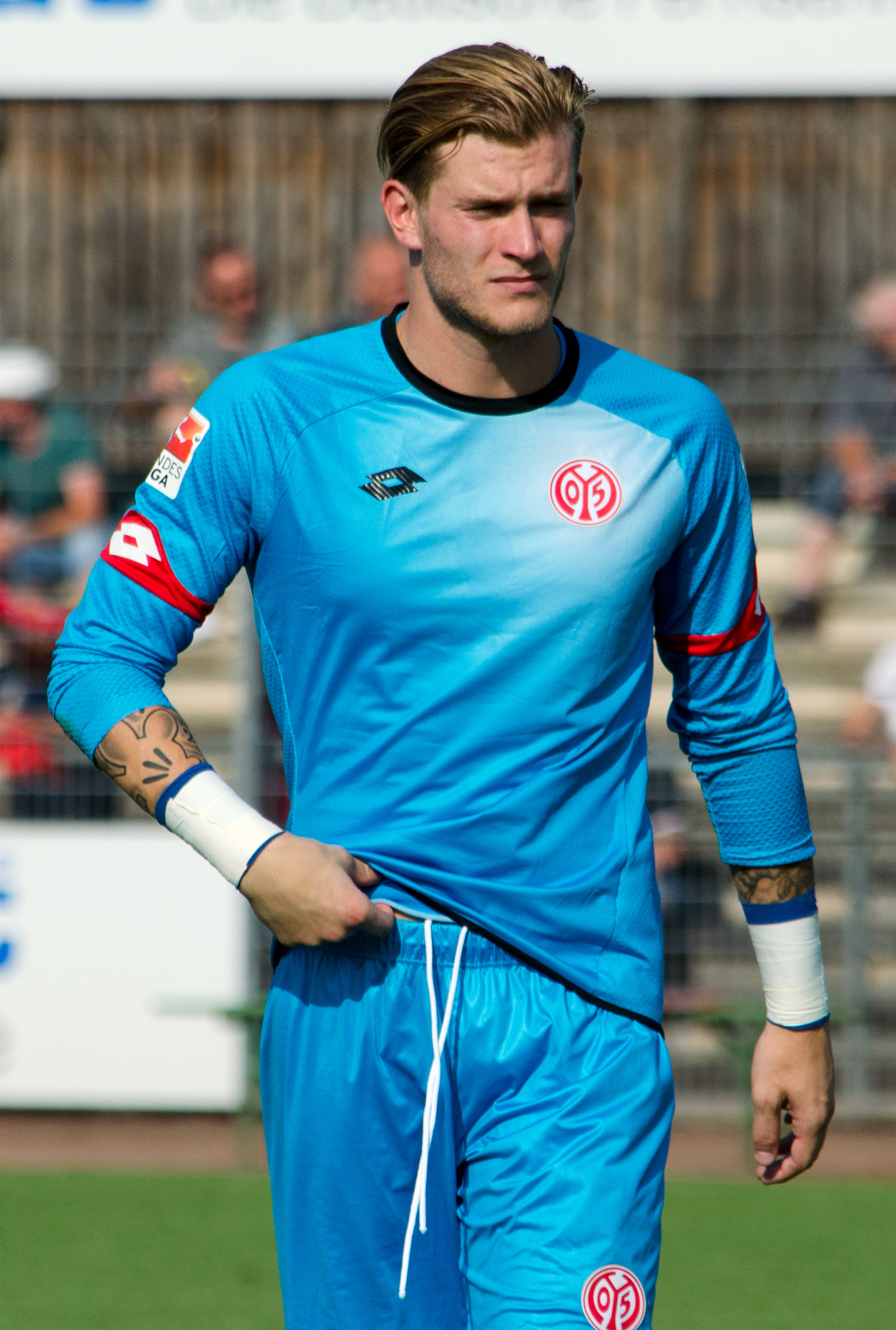 Loris Karius, deutscher Fußballtorhüter